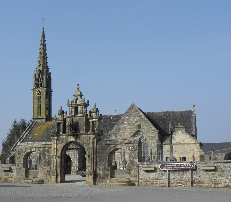 Enclos paroissial d'Argol (29).